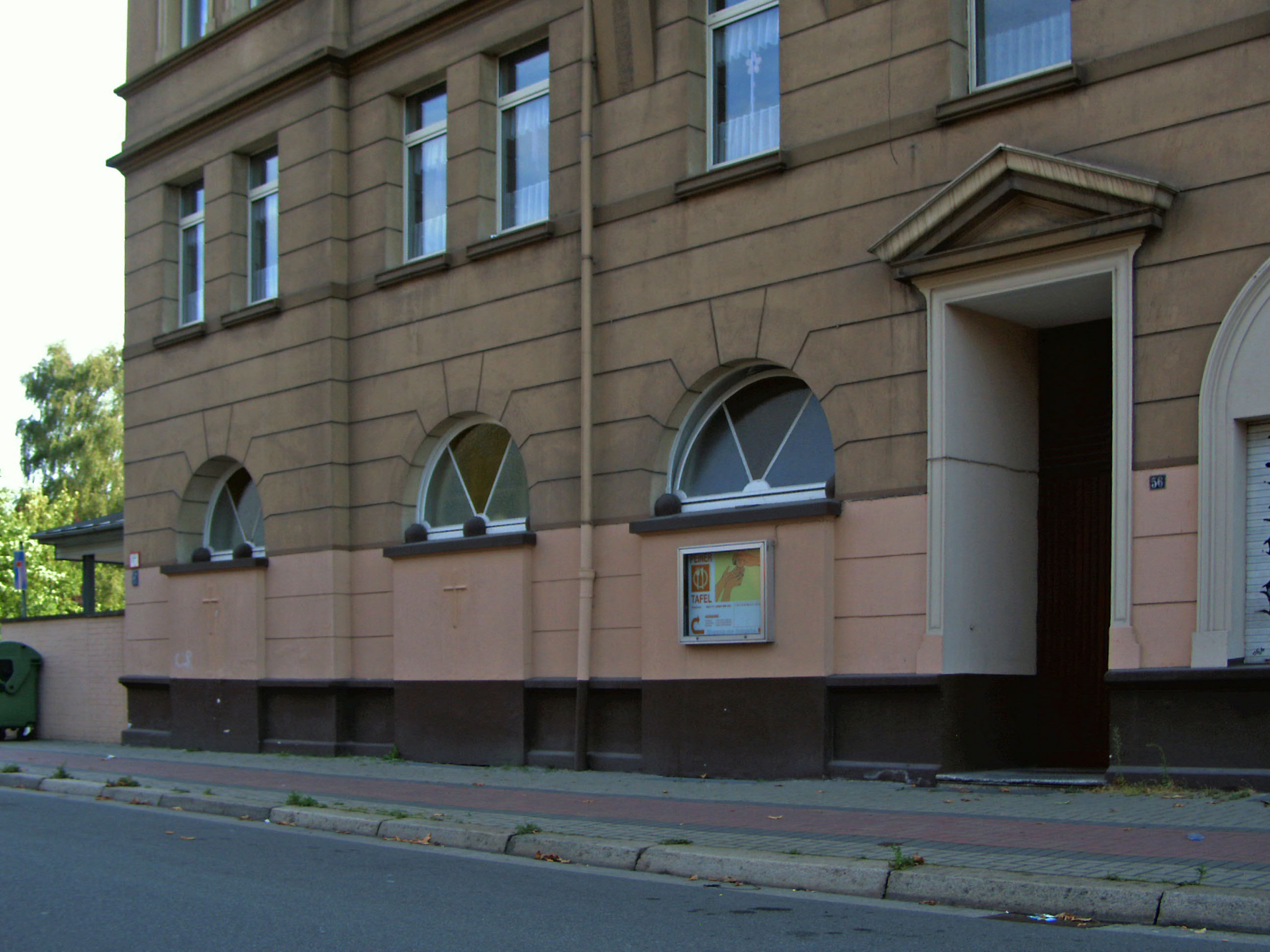 Peiner Tafel in ehemaliger katholischer Herz-Jesu-Kapelle in Peine.